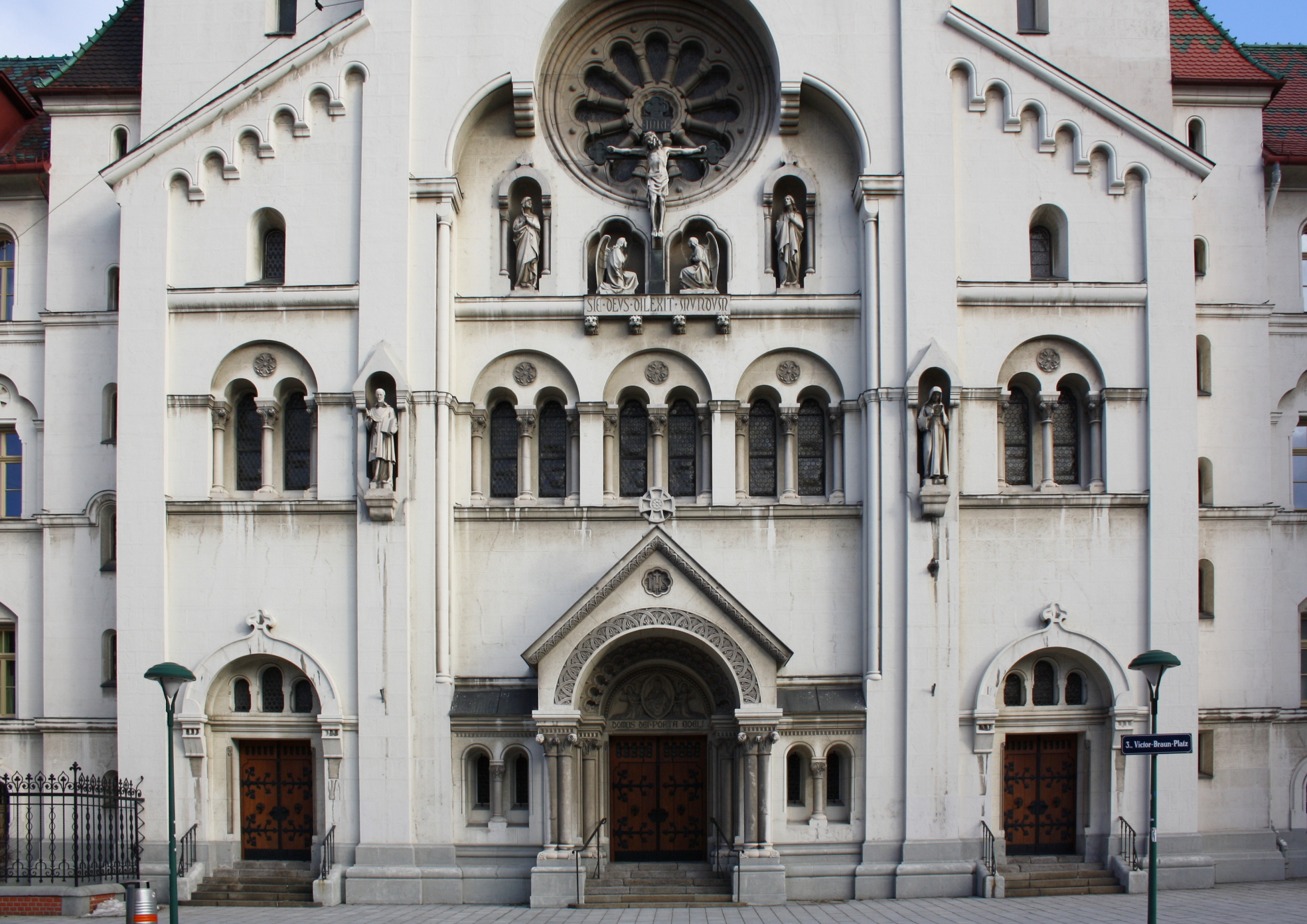 Hauptportal der Herz-Jesu-Kirche im 3. Wiener Gemeindebezirk (Landstraße).